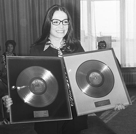 Nana Mouskouri is in Scheveningen voor het in ontvangst nemen van twee gouden platen in 1971.